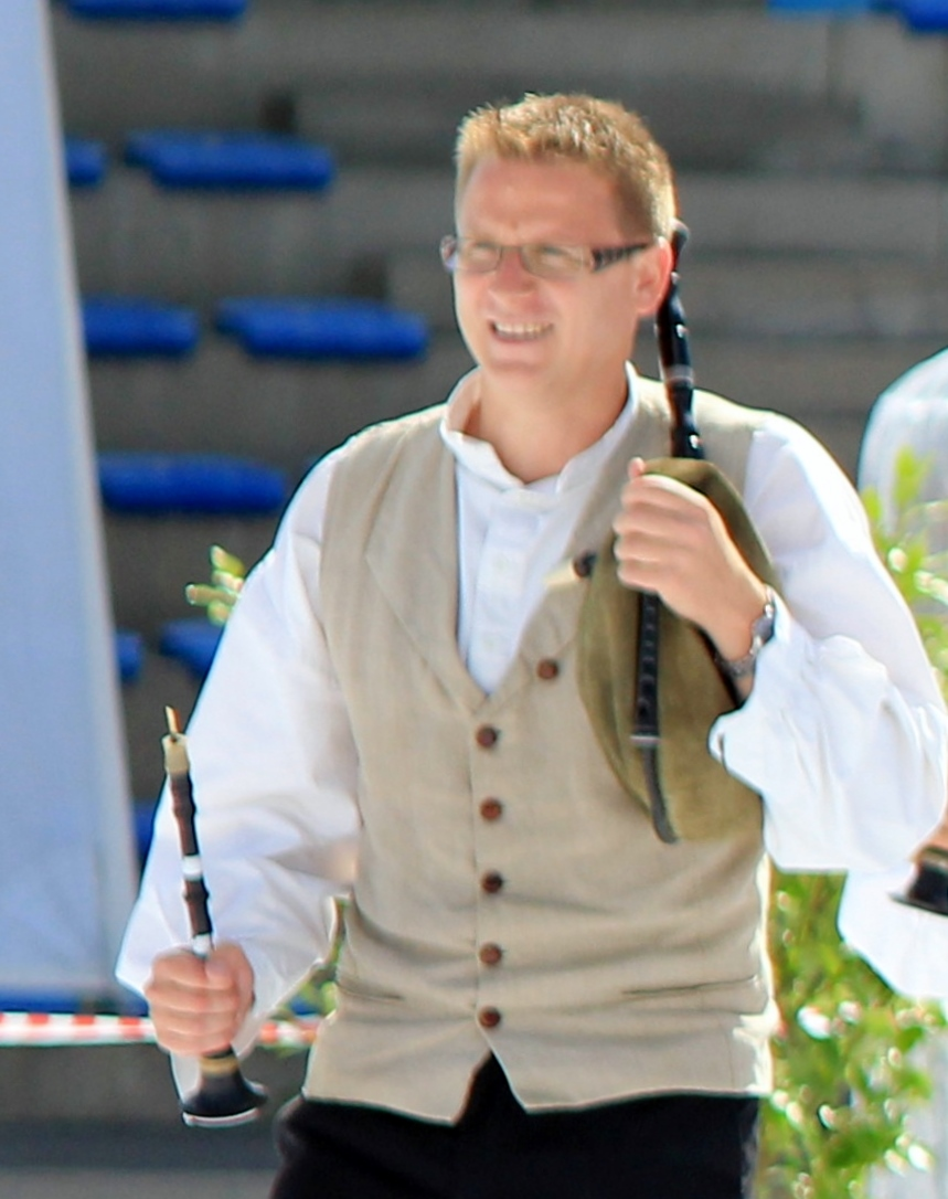 Gildas Roger, ancien penn-soner de Quic-en-Groigne lors de l'épreuve de Lorient du championnat national des bagadoù organisée dans le cadre du festival interceltique de Lorient 2013.